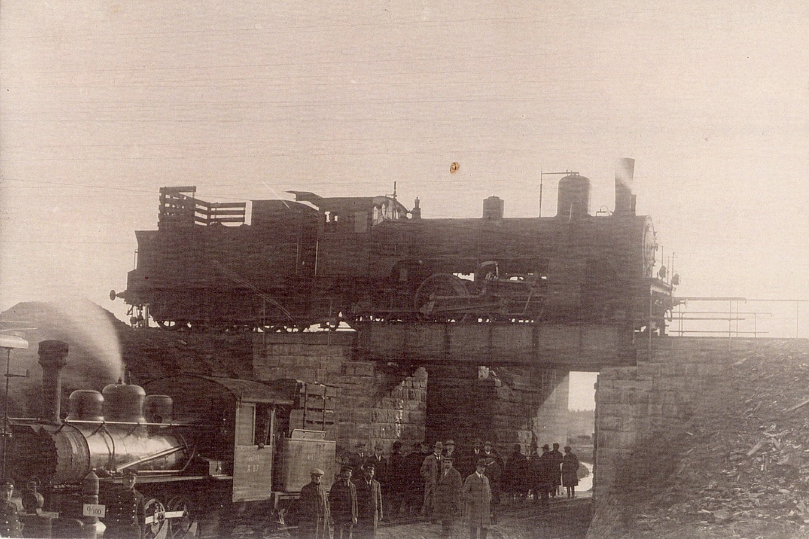 Valga - Kaagjärve - Koikküla raudtee vastuvõtukomisjon